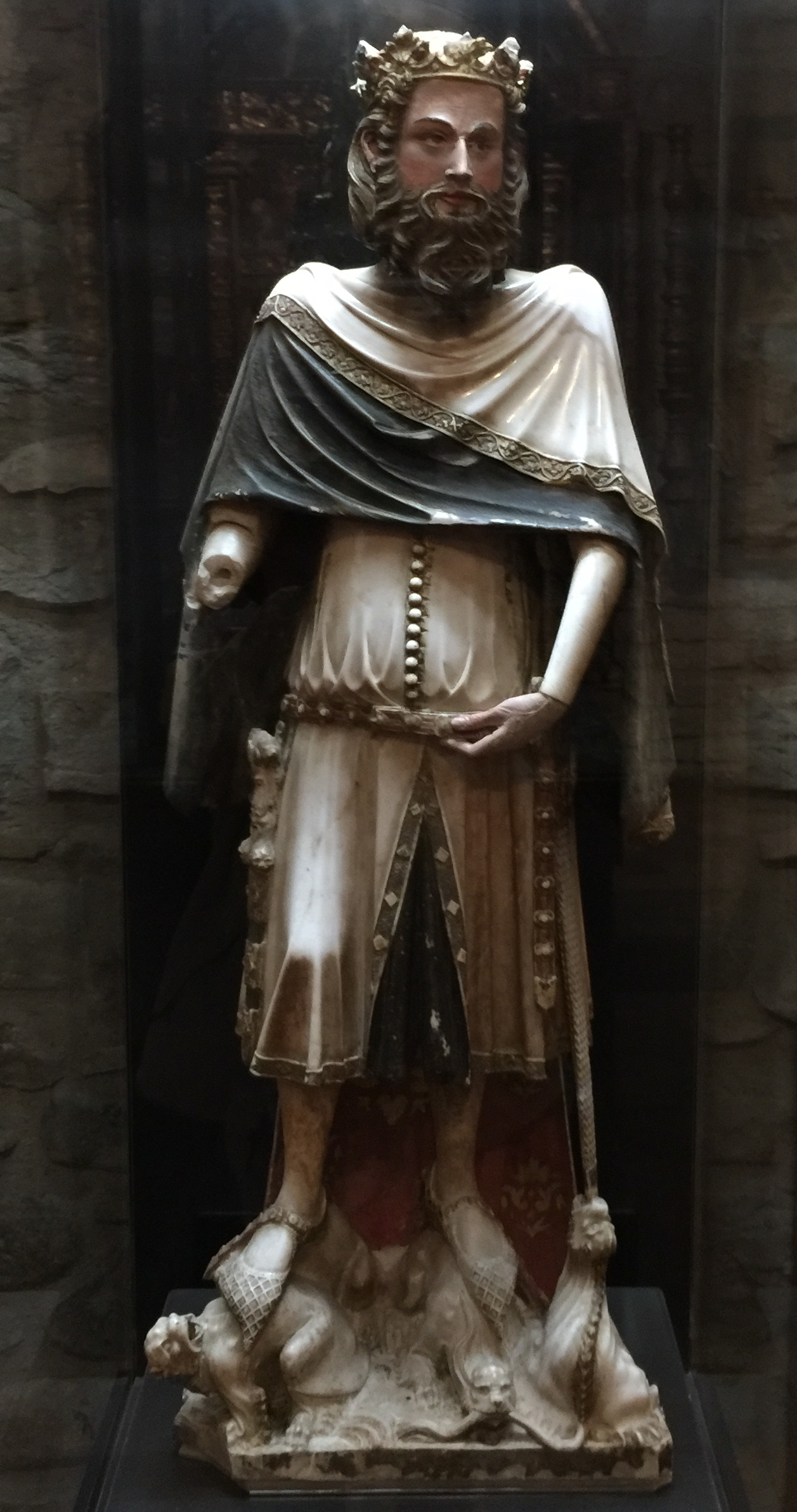 Statue de Charlemagne par Jaume Cascalls vers 1345. Albâtre taillé polychrome. Cathédrale de Gérone.